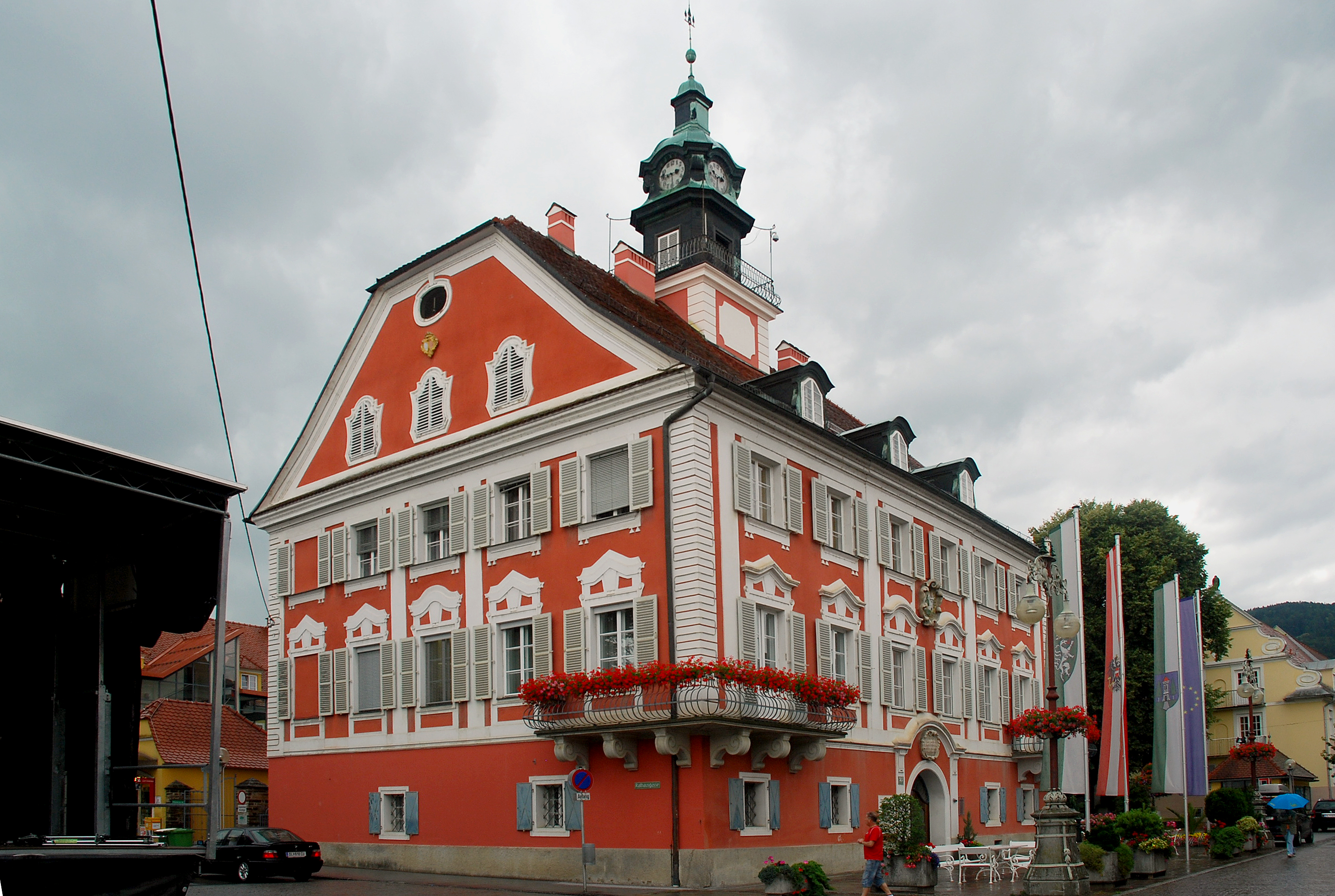 Deutschlandsberg, Steiermark, Österreich: Hauptplatz Rathaus